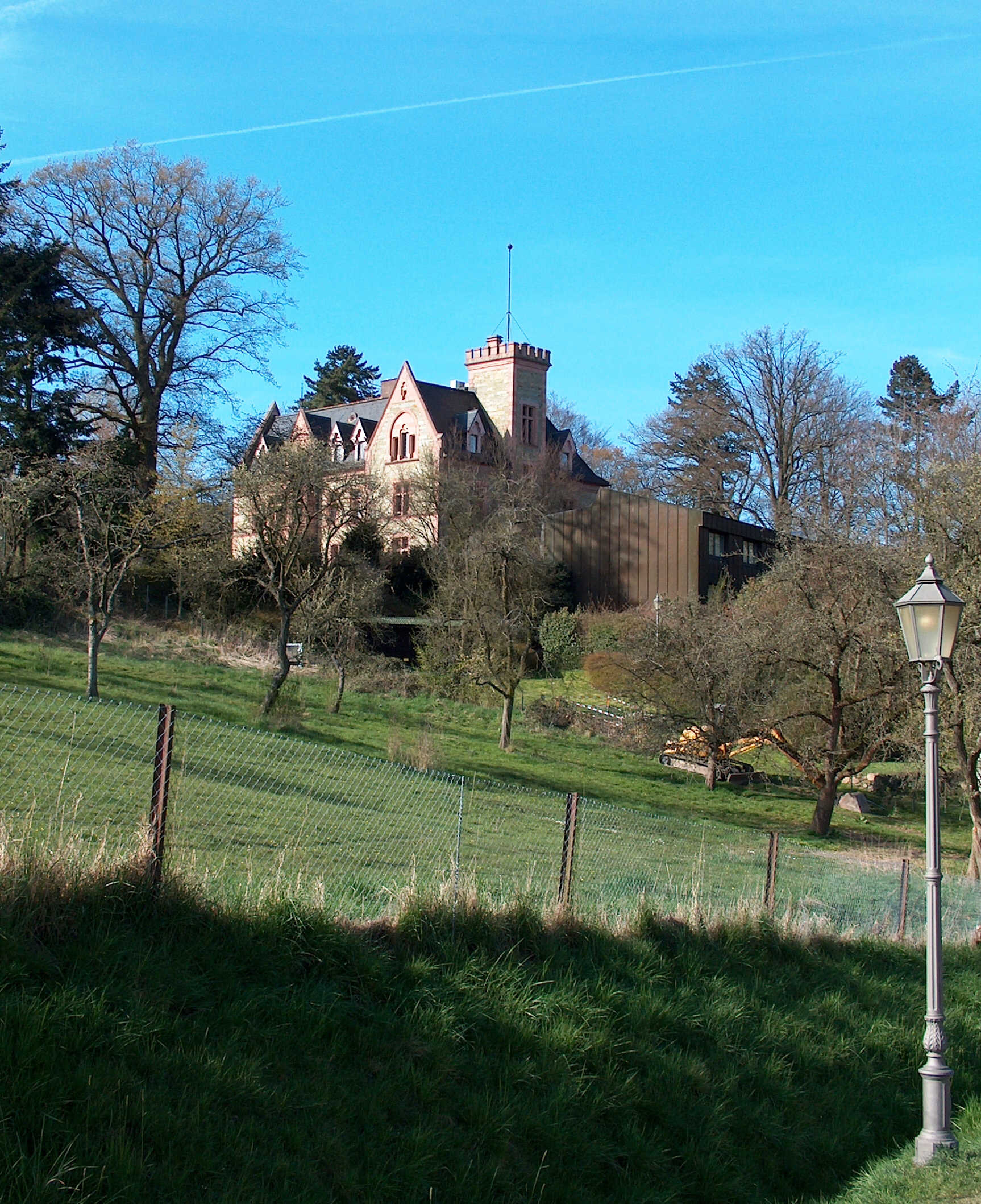 en.: Rettershof at Kelkheim near Frankfurt, Germany; dt.: Rettershof in Kelkheim bei Frankfurt/Main